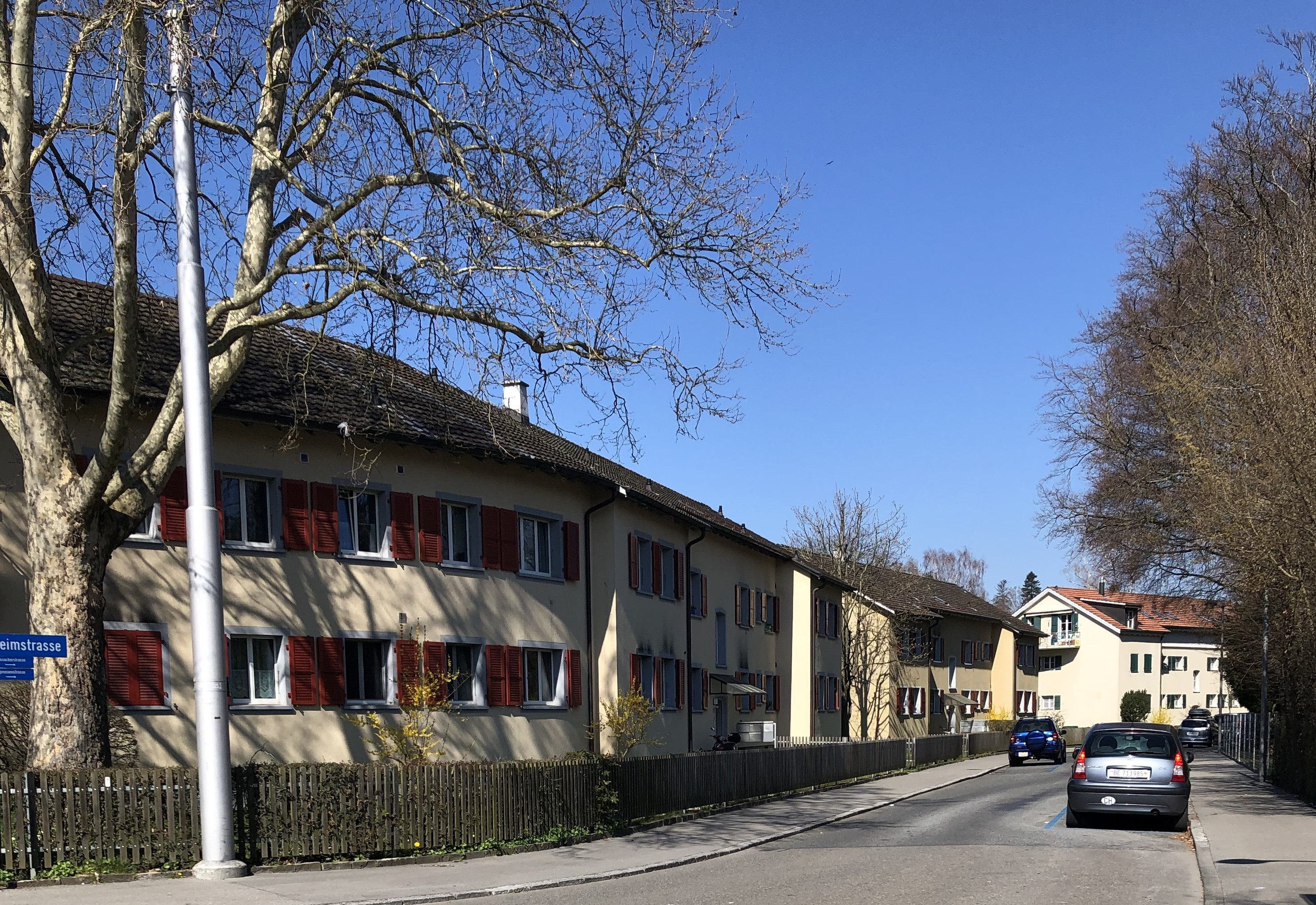 Winterhale Bebaung Siedlung